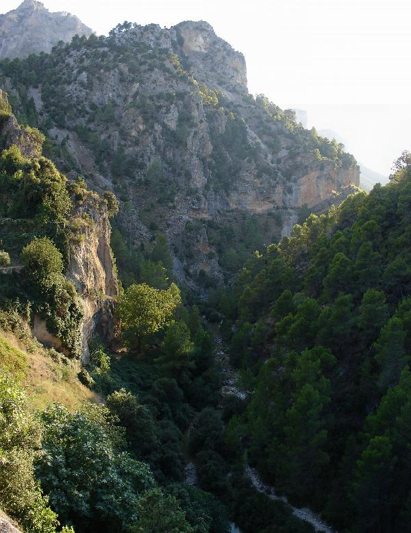 Cañón del río Tus